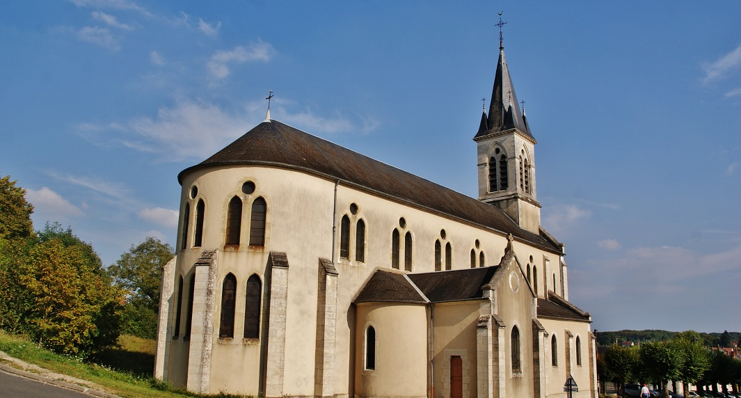 église St Germain